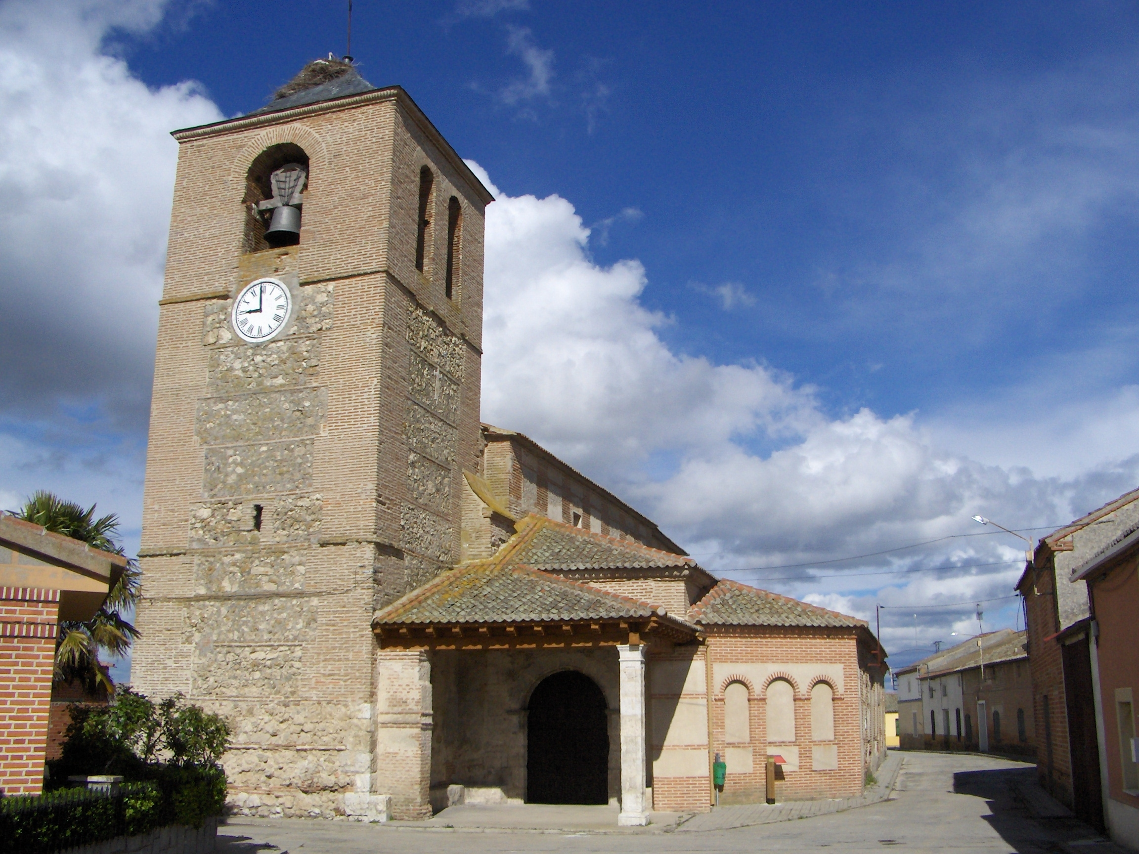 Vistas del municipio de Villeguillo, desde la plazoleta de la Iglesia parroquial.